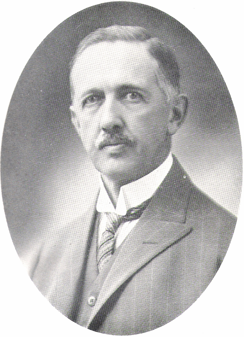 Axel Mörner, greve, politiker, landshövding i Hallands län.